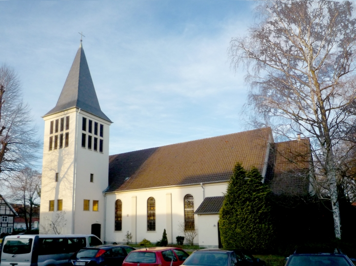 Rheda-Wiedenbrück, evangelische Kreuzkirche